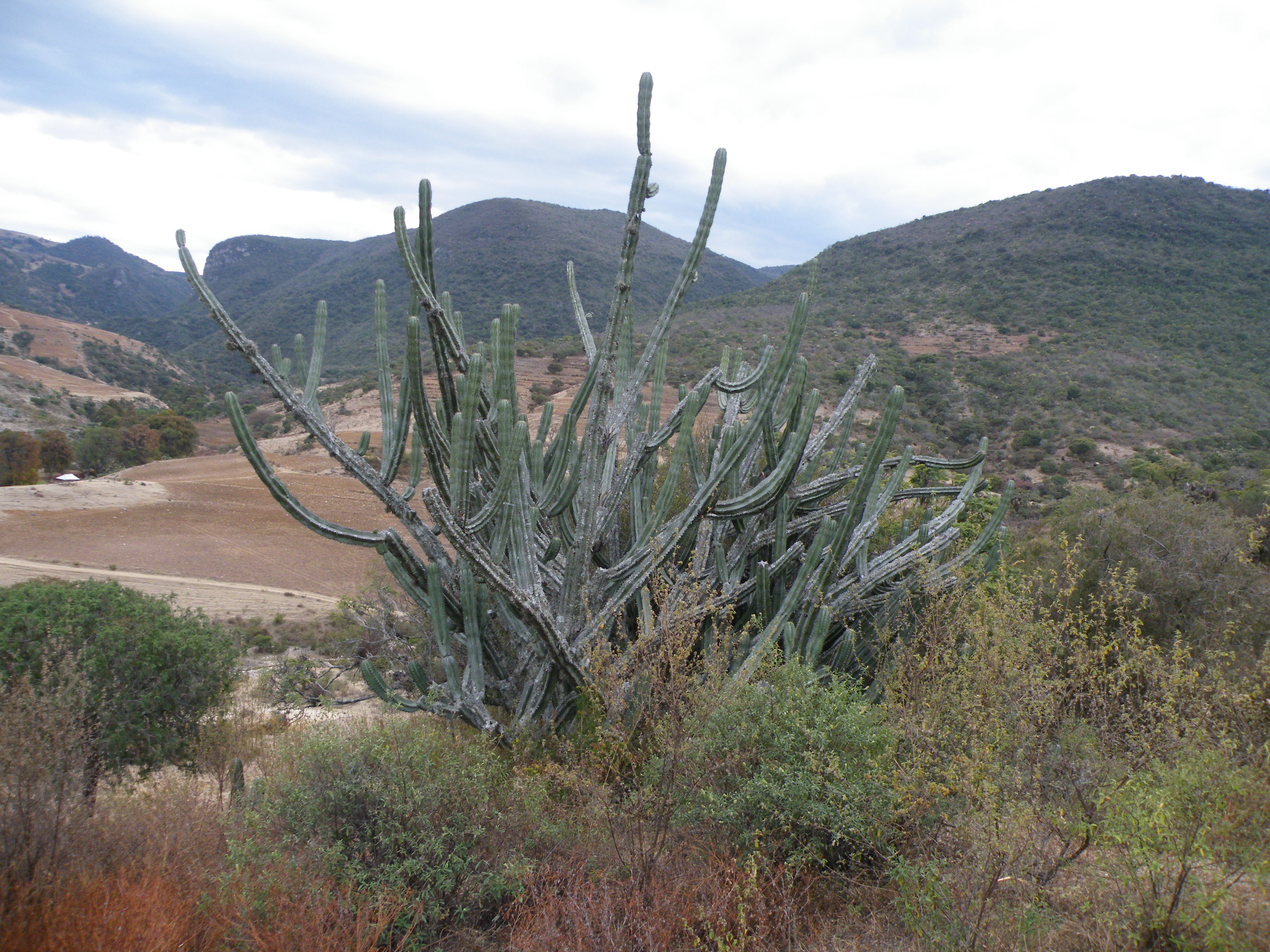 West point 109, Oaxaca